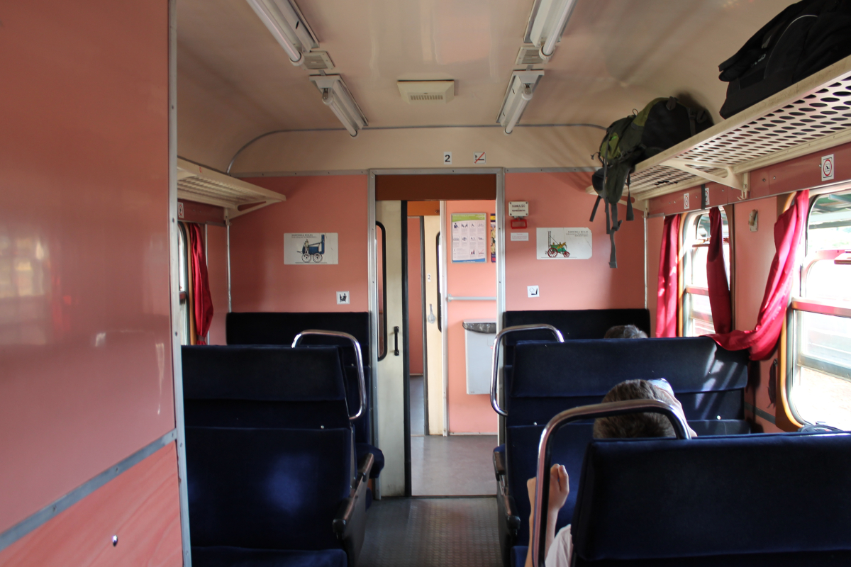 Przedział 2. klasy w elektrycznym zespole trakcyjnym ED72-009. This photo was taken during Railway Wikiexpedition 2014 set up by Wikimedia Polska Association in cooperation with Fundacja Grupy PKP. You can see all photographs in category Wikiekspedycja kolejowa 2014.